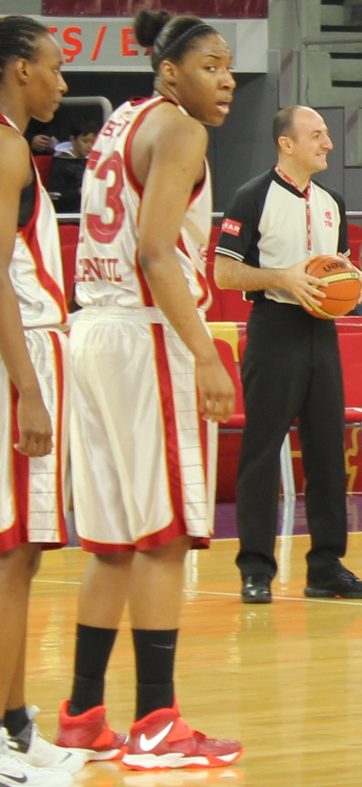 Kelsey Bone